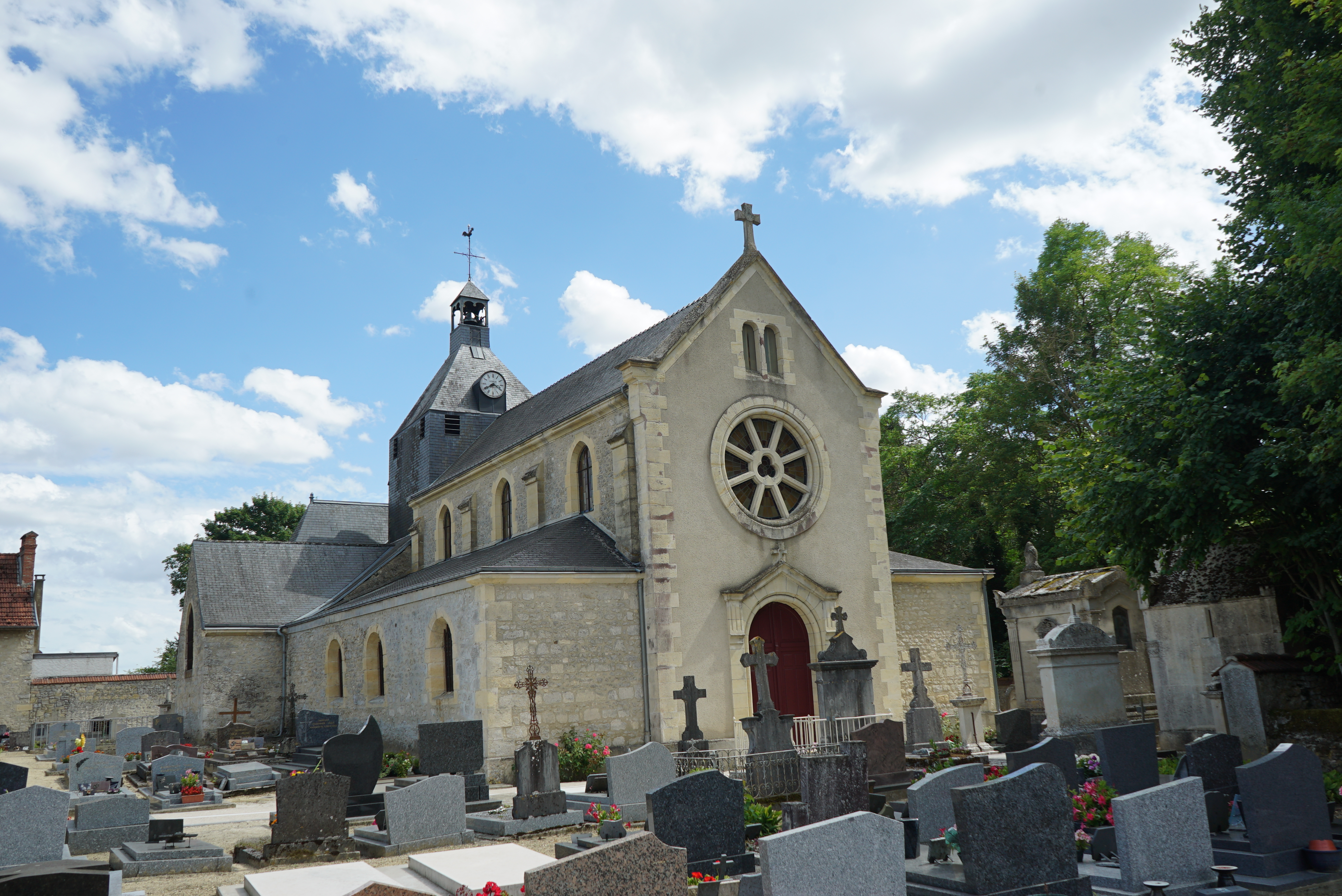 une vue du village.